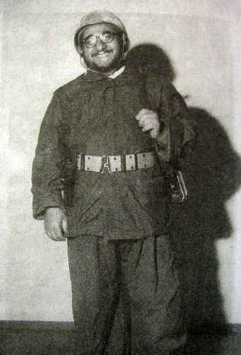 صادق خلخالی در جامه جنگی